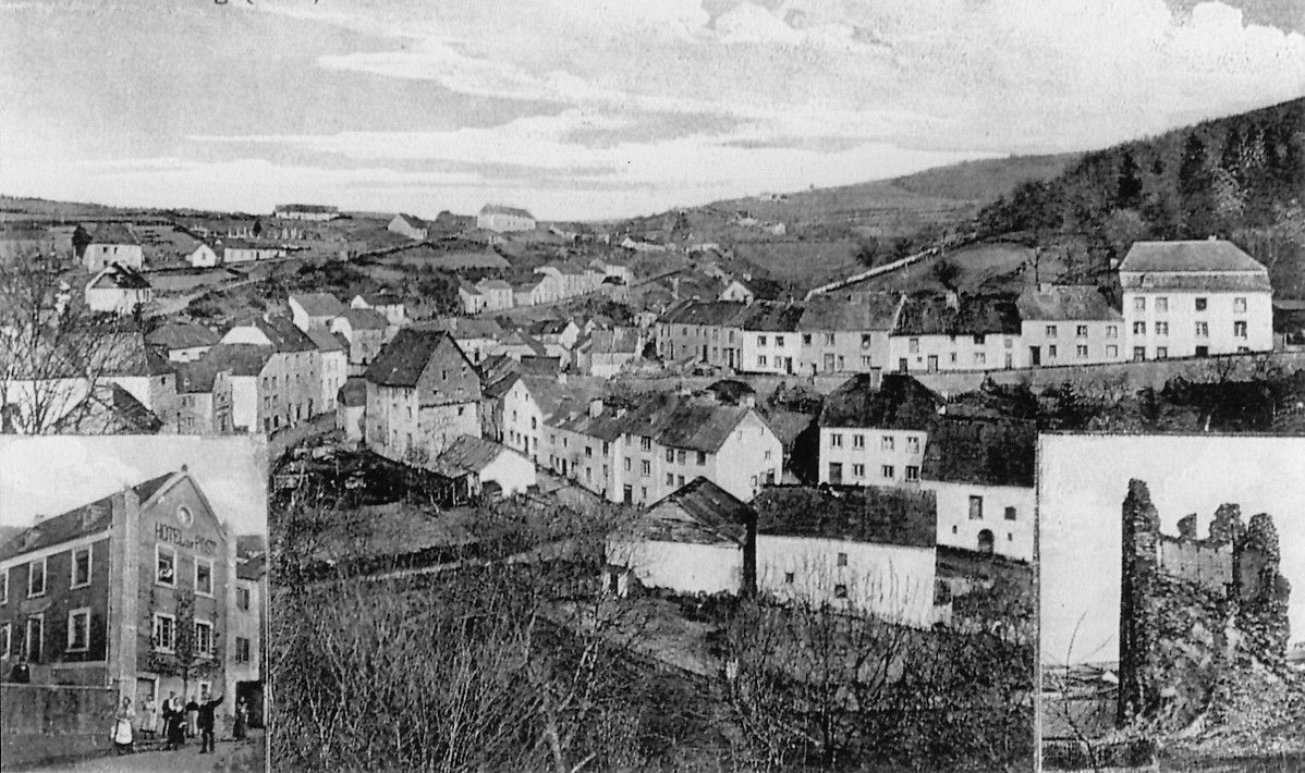 Dasburg um das Jahr 1910. Dieses Bild wurde für die Website von Dasburg.de zur freien Verfügung frei gegeben.